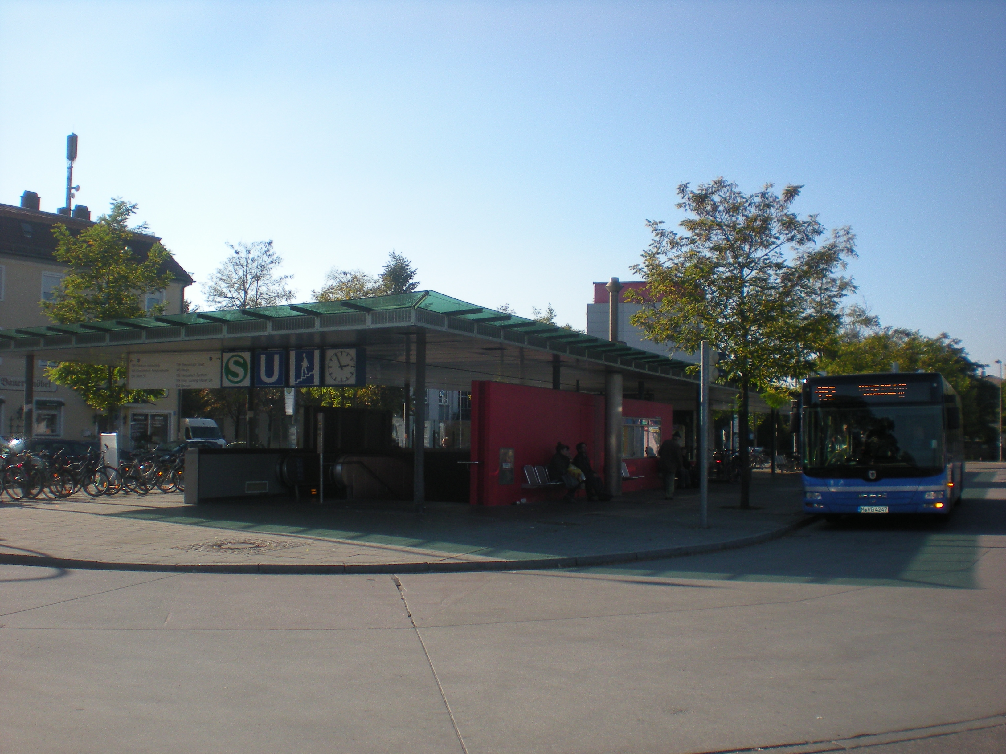 Busbahnhof des Bahnhofs München-Trudering mit Bus der Linie 192 nach Neuperlach Zentrum